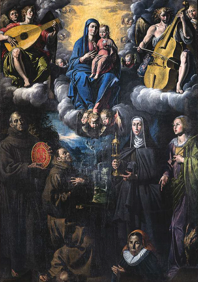 La grande tela della Madonna dell'Incendio Sedato, nella Collegiata di Pescocostanzo.